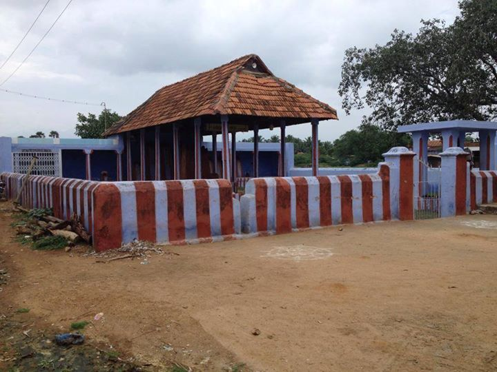 உள்ளமுடையார் சாஸ்த்தா திருக்கோவில், வேப்பிலாங்குளம்.